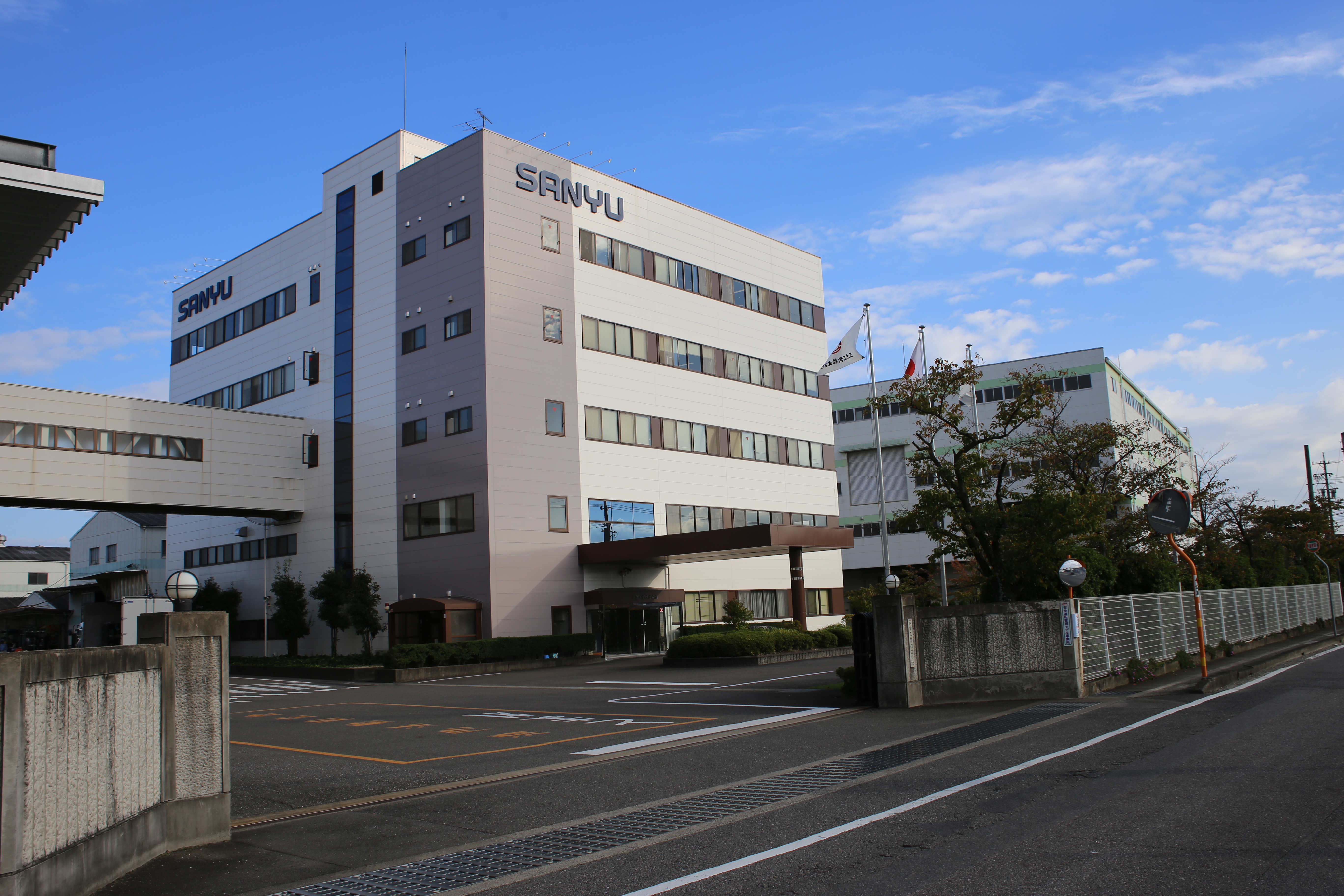 愛知県小牧市の三友工業本社